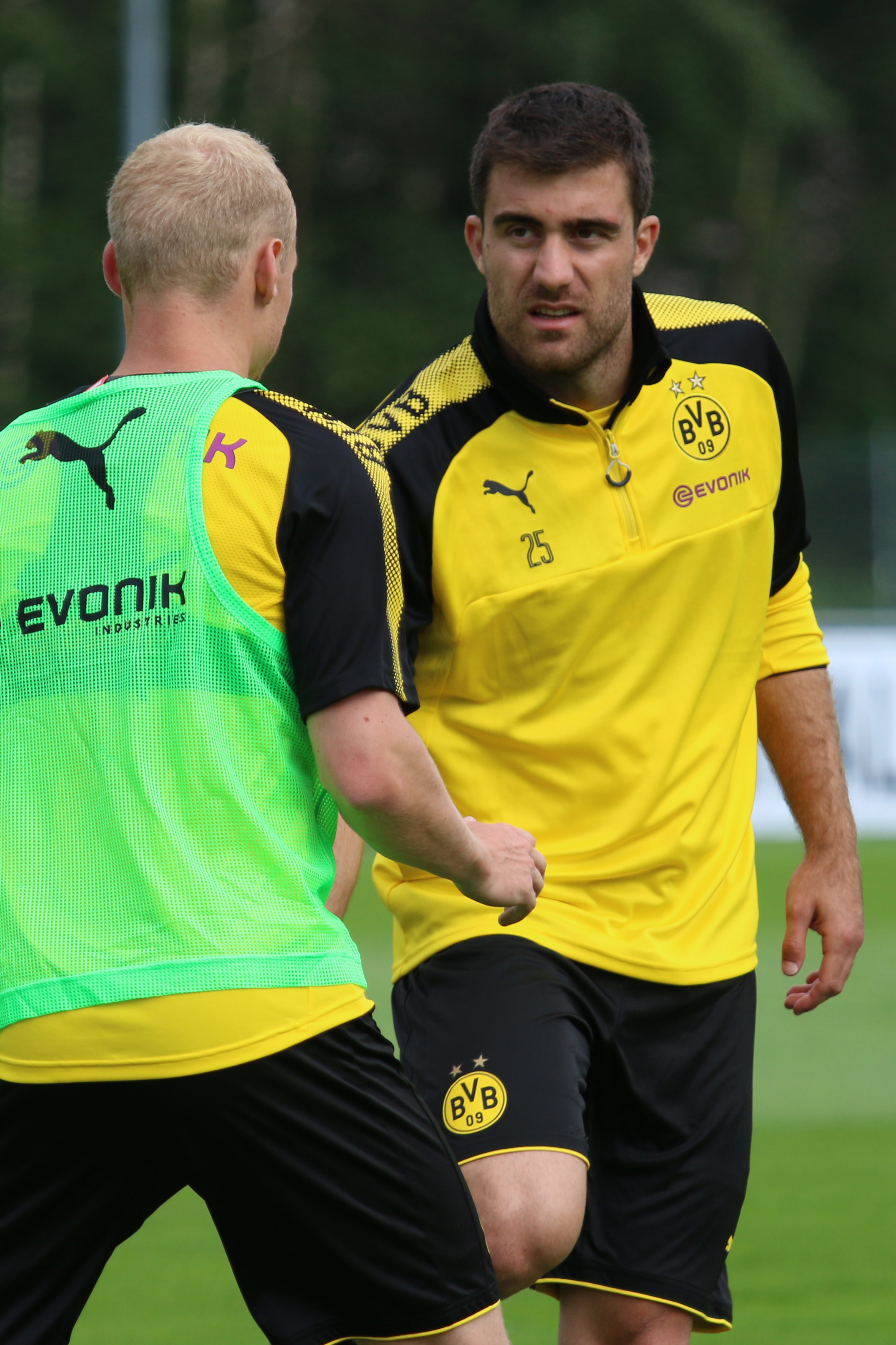 Sokratis im BVB Trainingslager in Bad Ragaz 2017